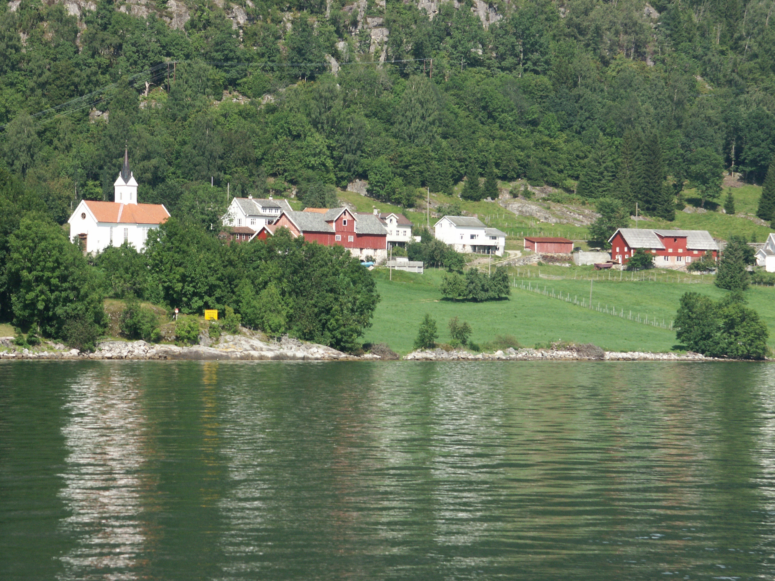 Tjugum ved Esefjorden